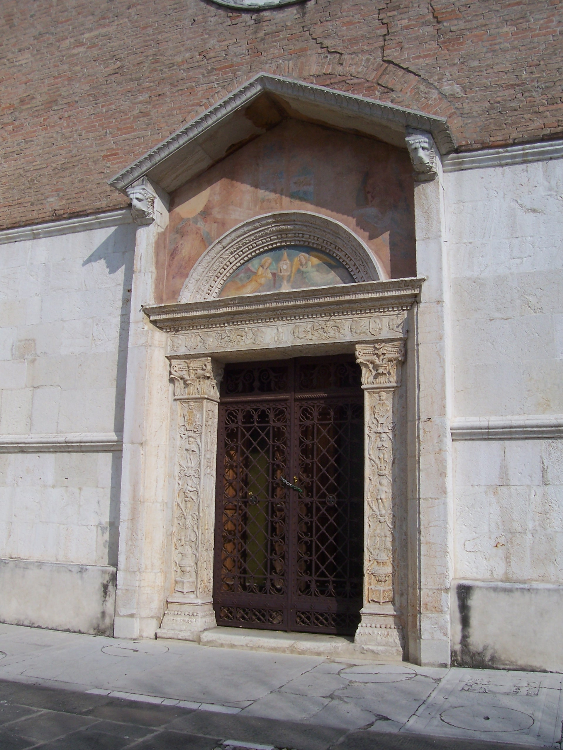 Santissimo corpo di cristo brescia portale.jpg